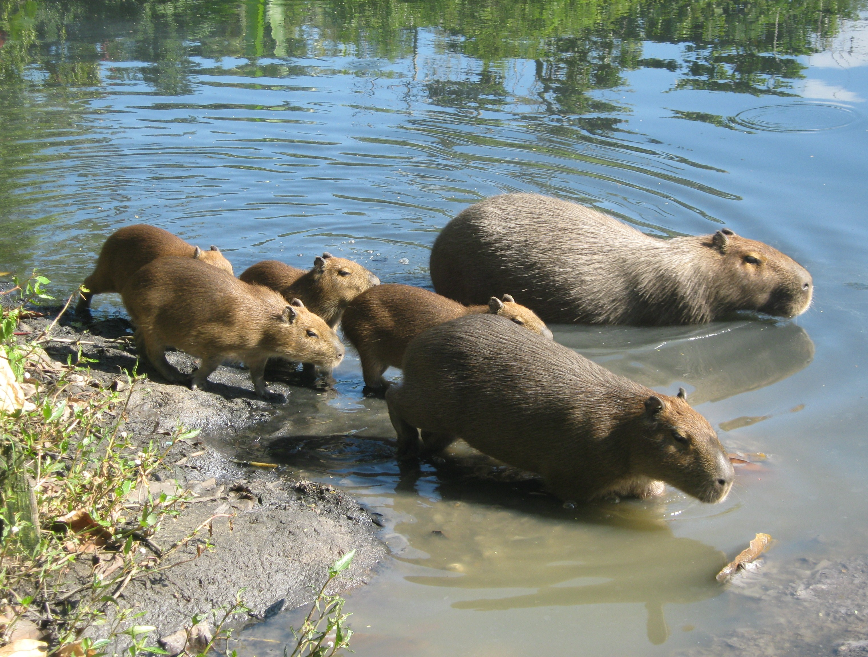 São ótimos nadadores